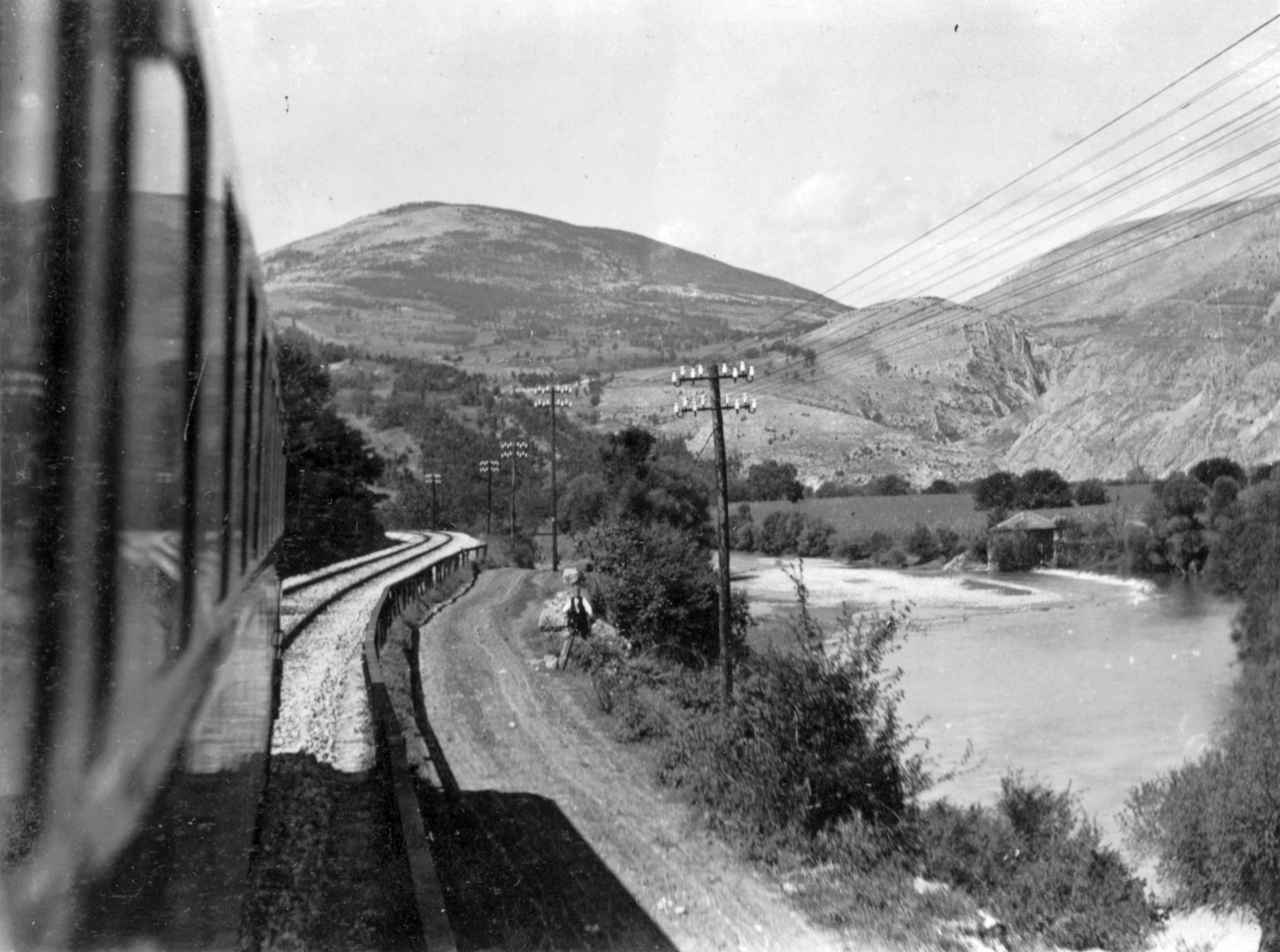 a Niseva folyó völgye. Location: Serbia Tags: railway, river, hillside, rails Title: a Niseva folyó völgye.